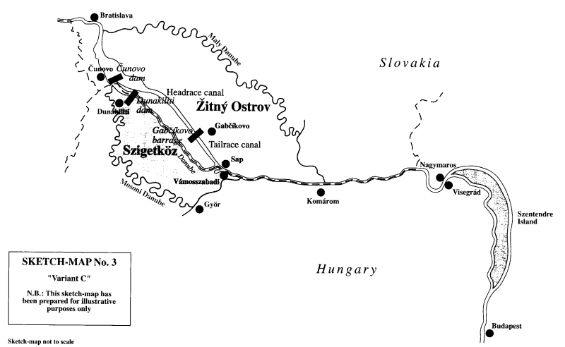 ガブチコボ・ナジュマロシュ計画事件ICJ判決で問題とされた、「ヴァリアントC」計画